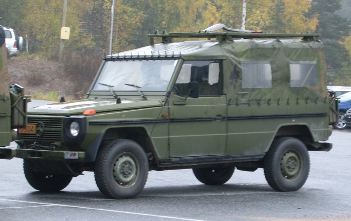 Norwegian military Mercedes-Benz Geländewagen jeep. Designation MB-240GD. Kongsberg, Norway 2005-10-08.